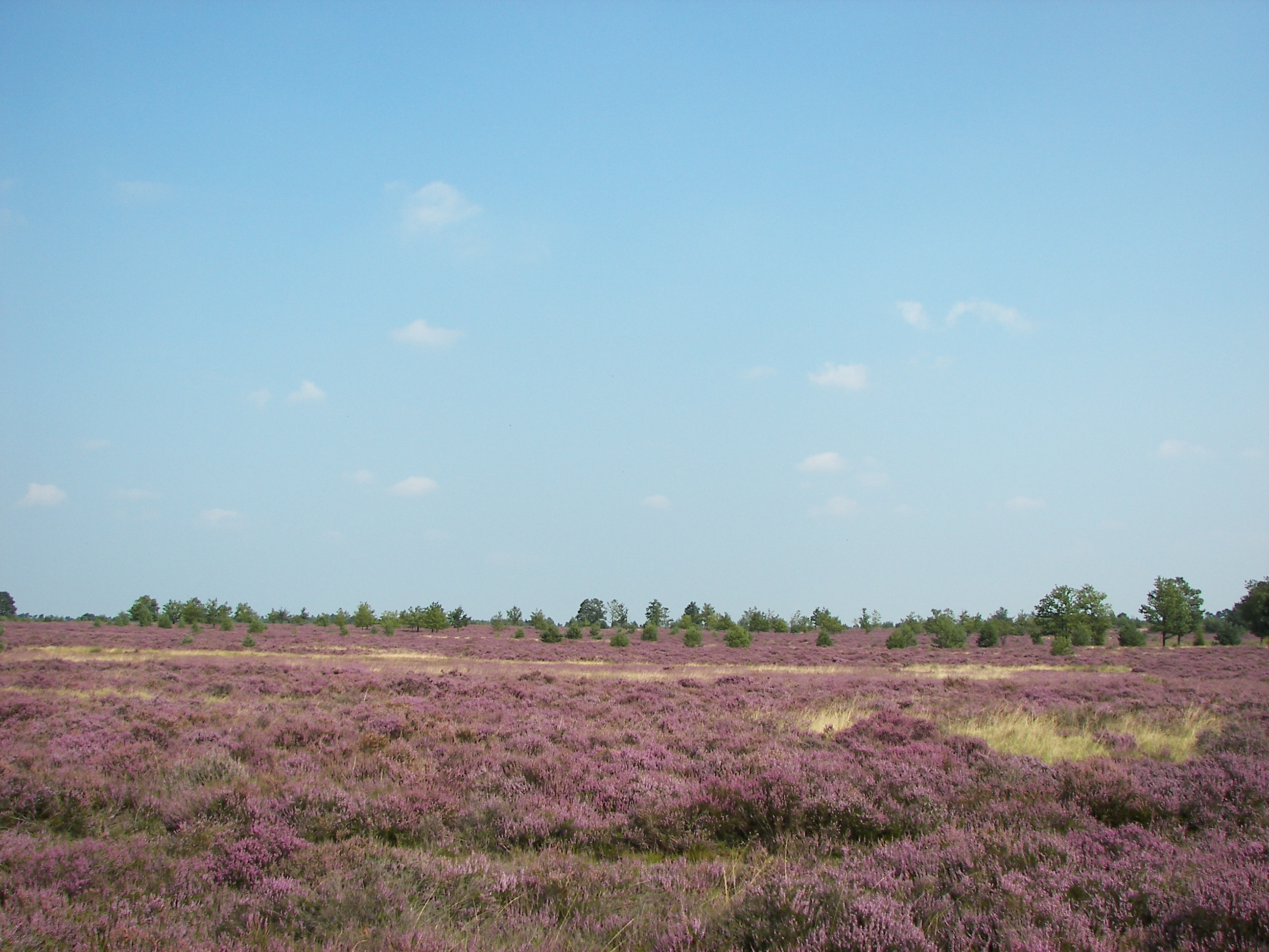 Osterheide bei Schneverdingen